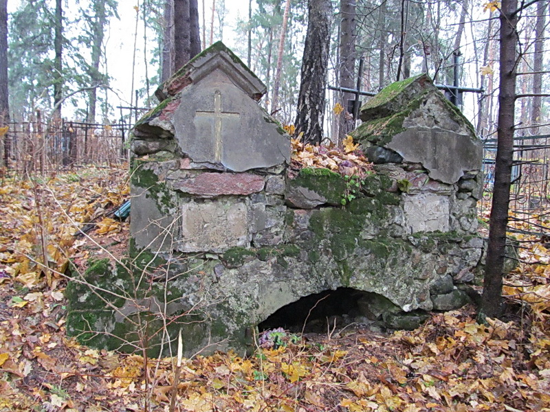 Камена. Могілкі. Фамільны склеп Жаброўскіх